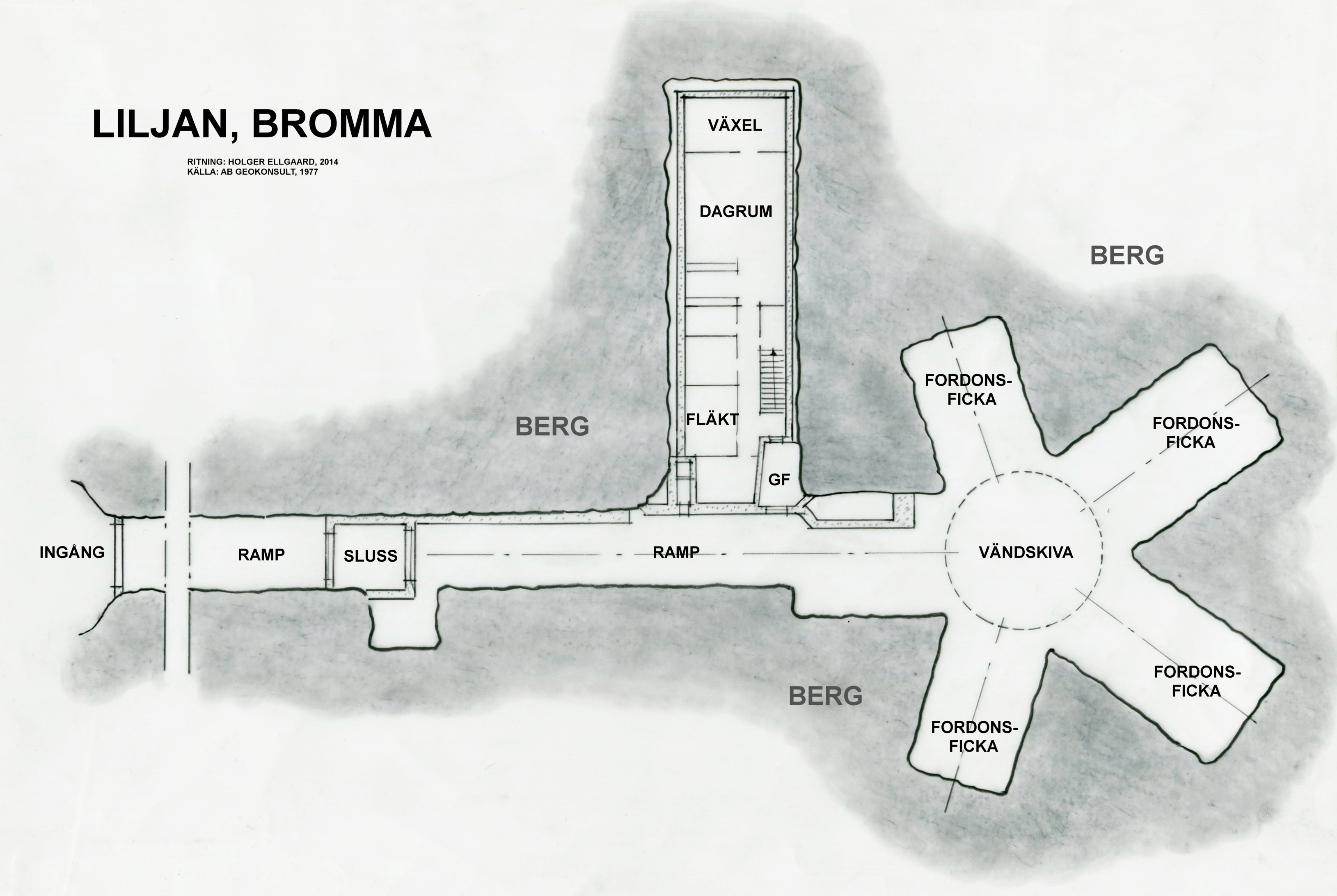 Framskjuten enhet (FE) "Liljan", ritning, källa: AB Geokonsult, 1977